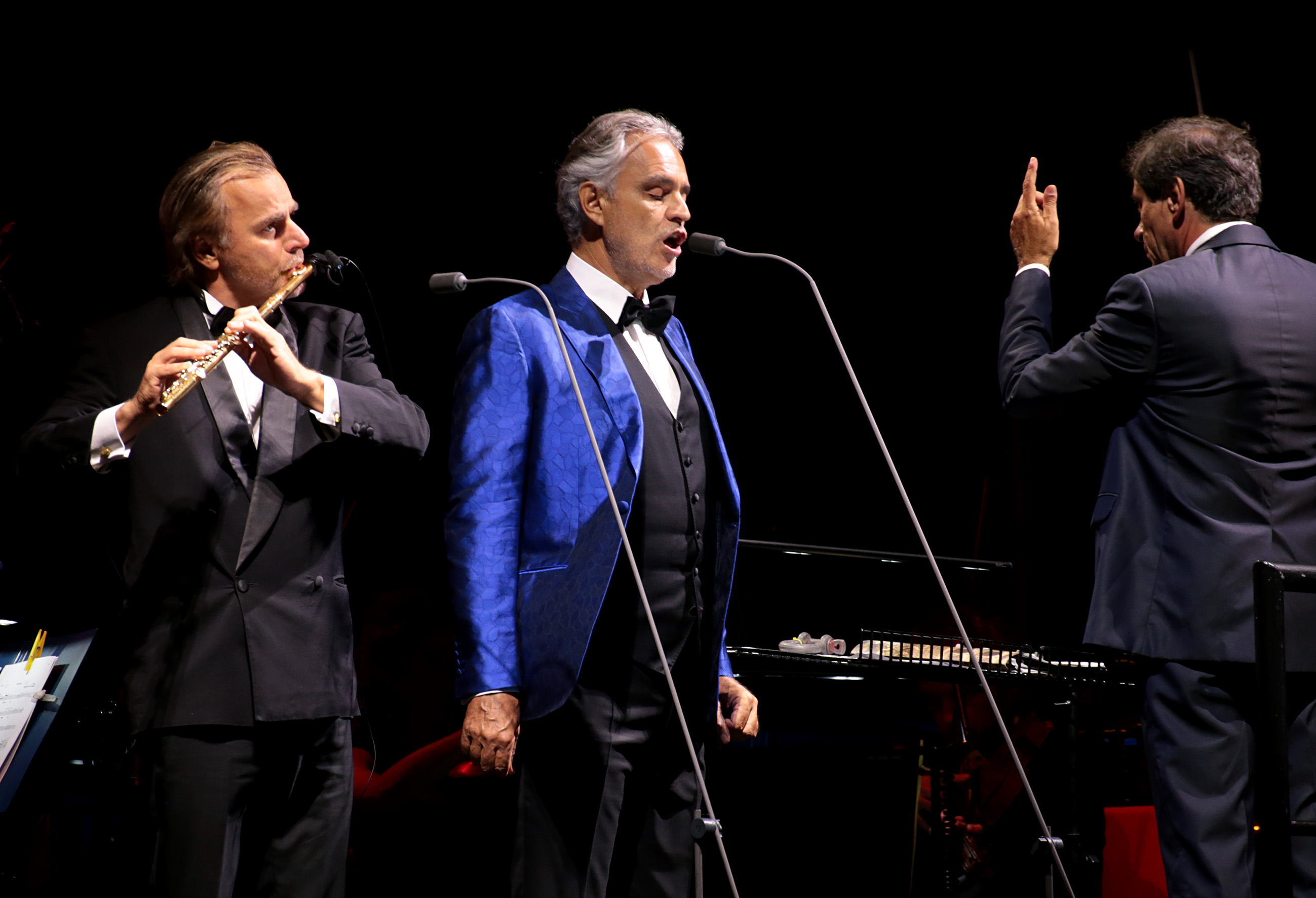 El flautista Andrea Griminelli interpretó algunas obras junto a Andrea Bocelli, pero también como solista (como las técnicamente complejas Czardas, de Vittorio Monti).